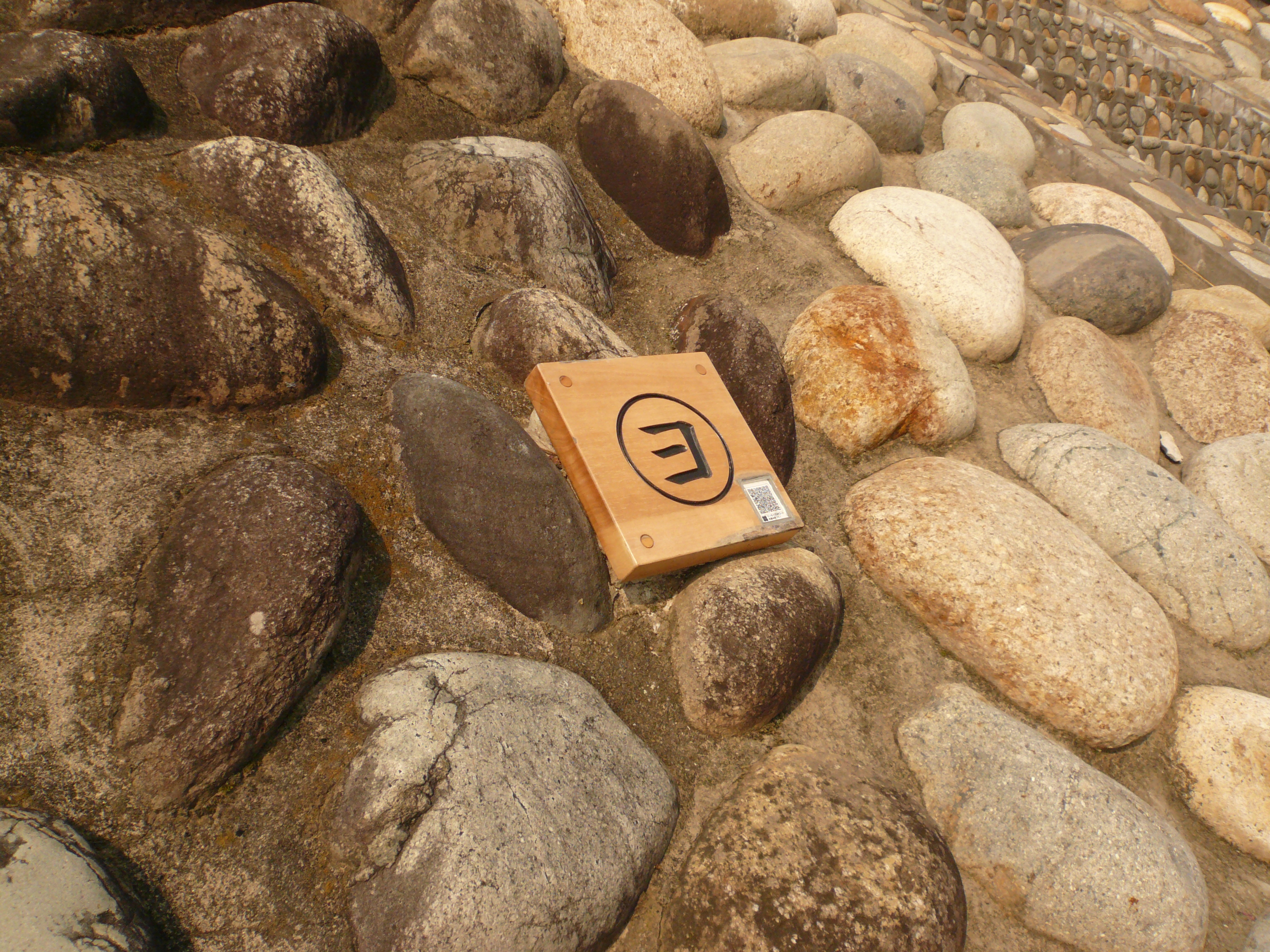 Ukai Nagaragawa（長良川鵜飼）,Gifu,Gifu(岐阜県岐阜市)で撮影。長良川の岸壁に取り付けられた鵜舟「マルヨ」のネームプレート。観光客のために携帯電話で情報が表示出来るようQRコードが付いている。